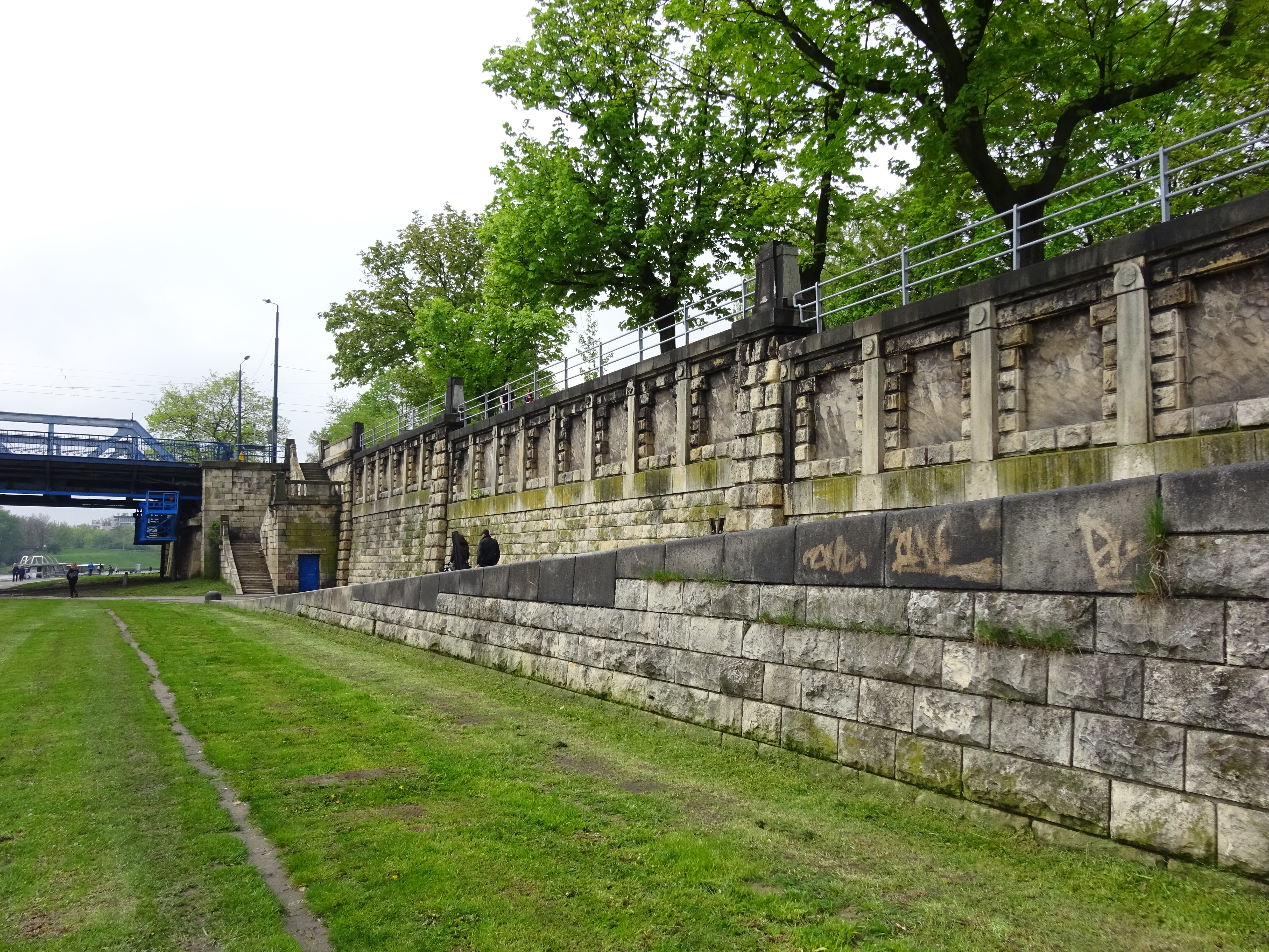 Zdobiony ornamentami mur oporowy na Bulwarach Wiślanych przy Moście Piłsudskiego. Kraków, 2017.